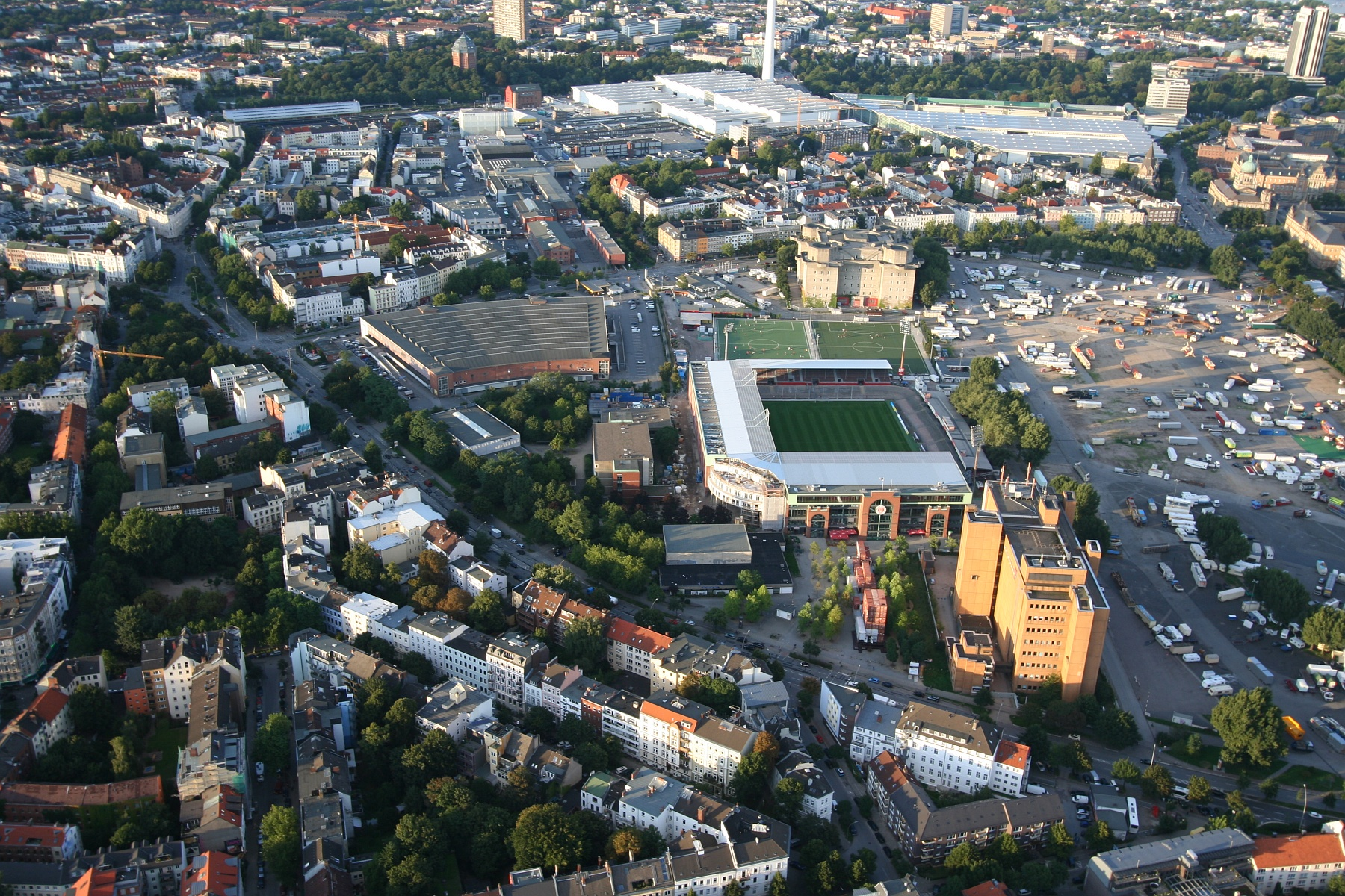 Vordergrund: Budapester Straße, Bildmitte: Millerntor-Stadion, Mitte rechts: Heiligengeistfeld, Hintergrund: Karolinenviertel, Messegelände